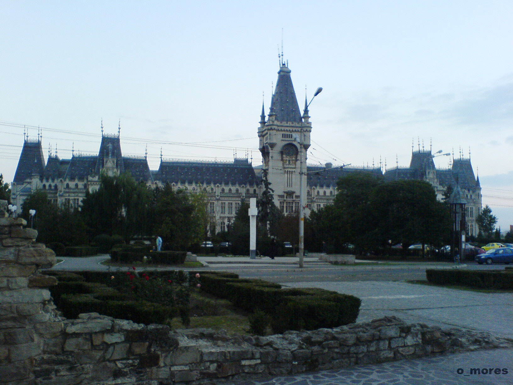 Palatul Culturii. Locaţie: Iaşi. Autor: o_mores 01